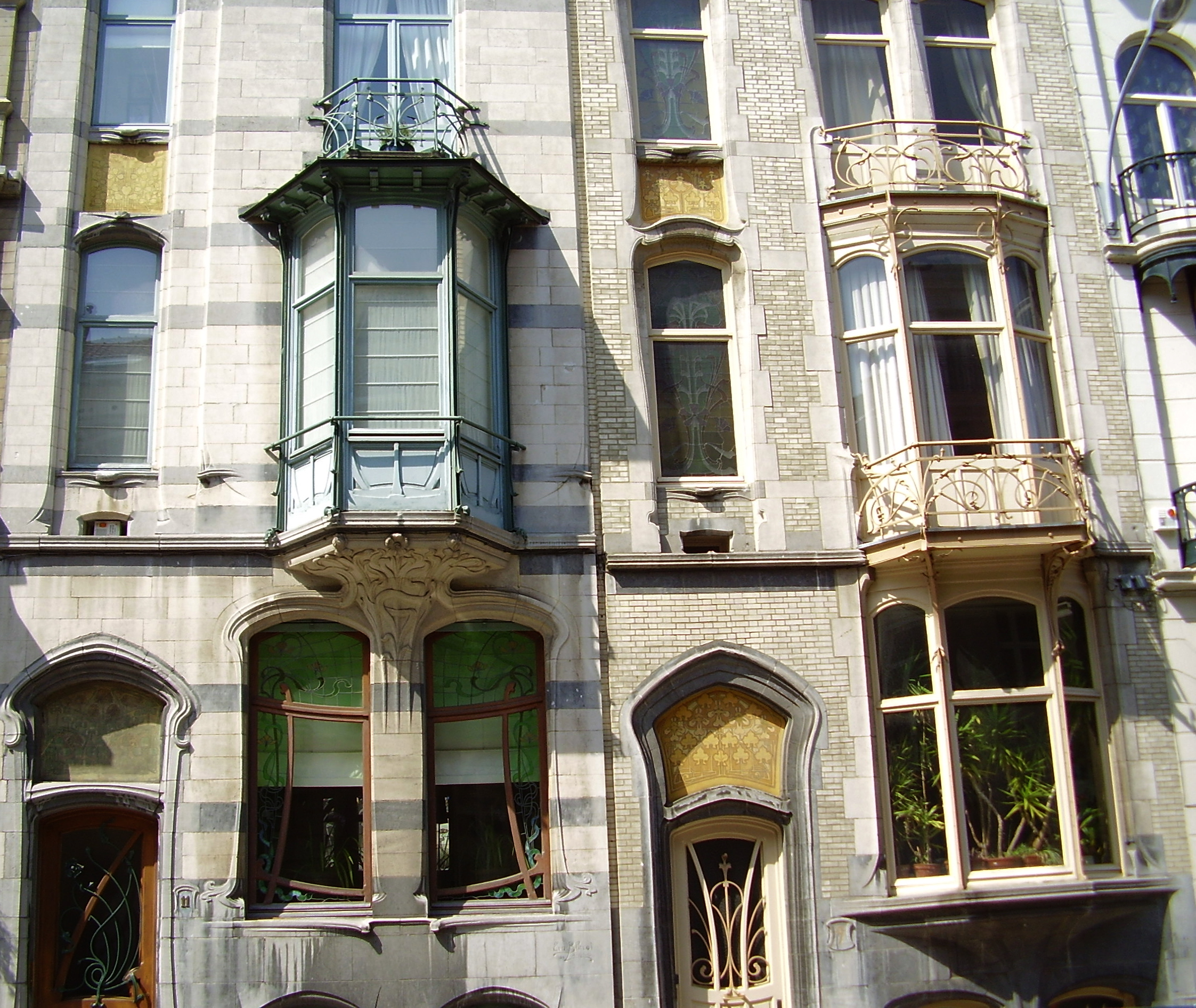 Ernest Blerot, architecte (1870-1957) - Ixelles (Bruxelles) - rue Vilain XIIII, 9 et 11